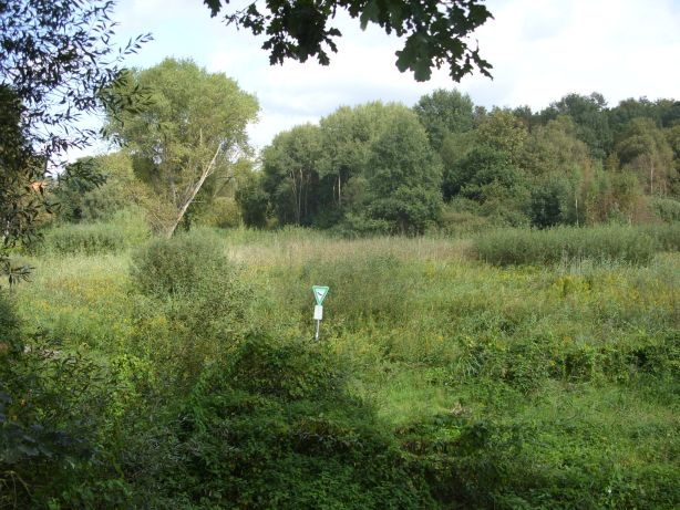 Naturschutzgebiet Ruschdahlmoor, Bremen-Burglesum, Ortsteil Lesum